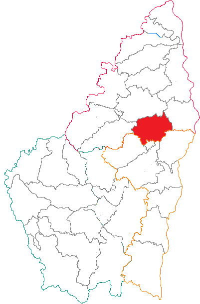 Situation du canton dans le département de l'Ardèche (France)